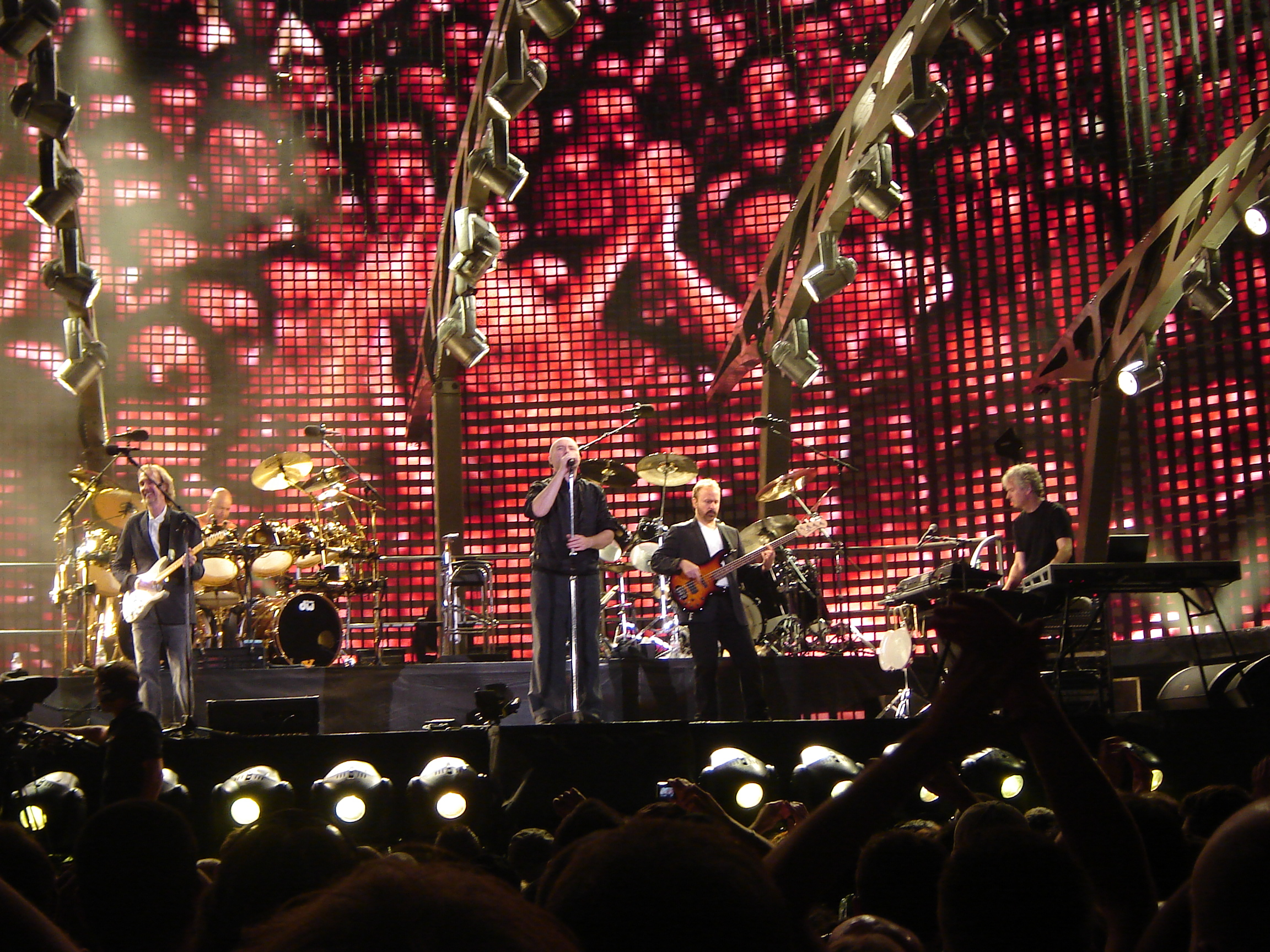 Genesis en Liono (12-07-2007). De maldekstre: Mike Rutherford, Chester Thompson, Phil Collins, Daryl Stuermer, Tony Banks.